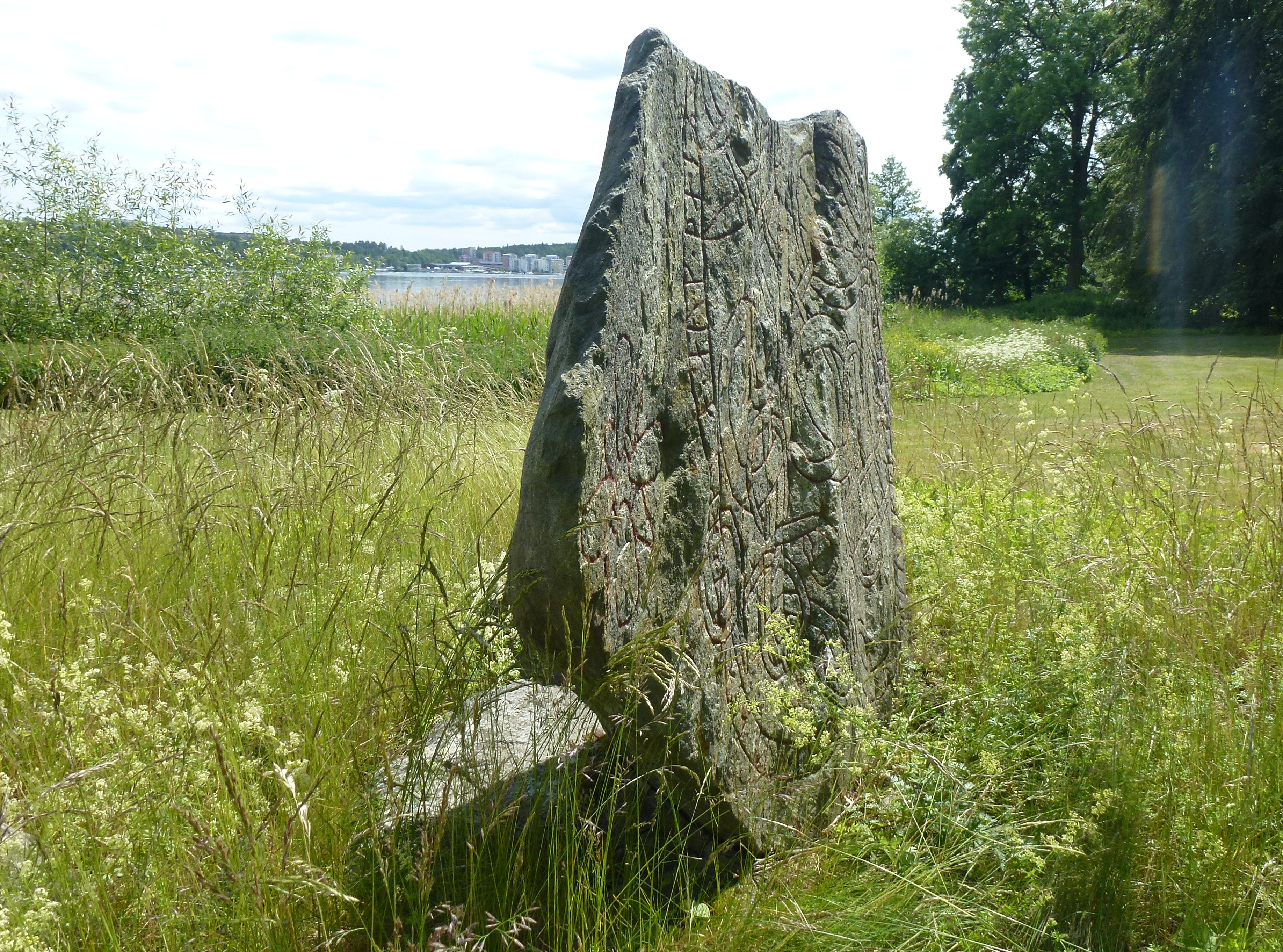 U 604, runsten vid Almare-Stäkets herrgård